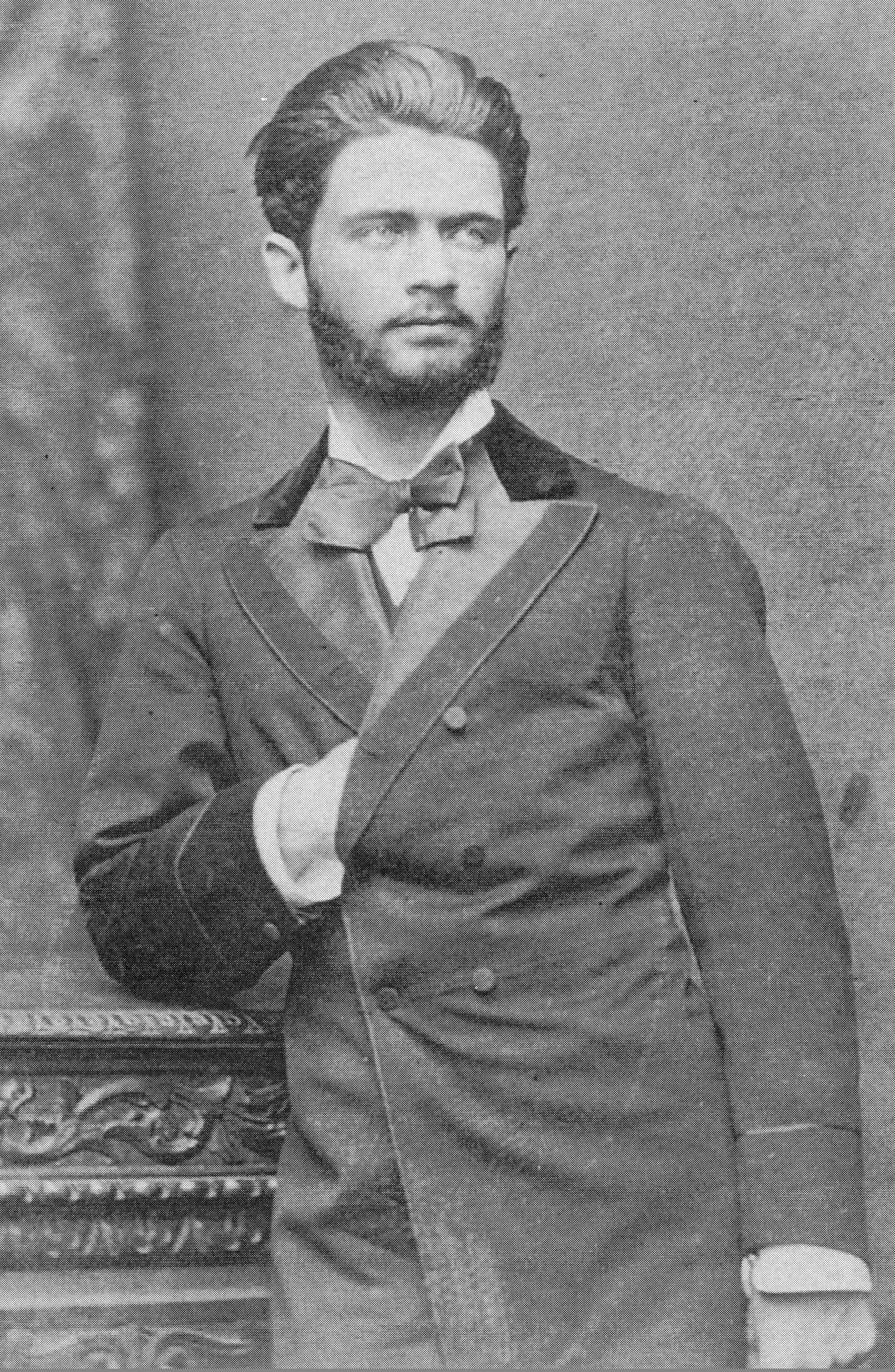 Retrato del poeta Domingo Rivero en Londres, hacia 1873.